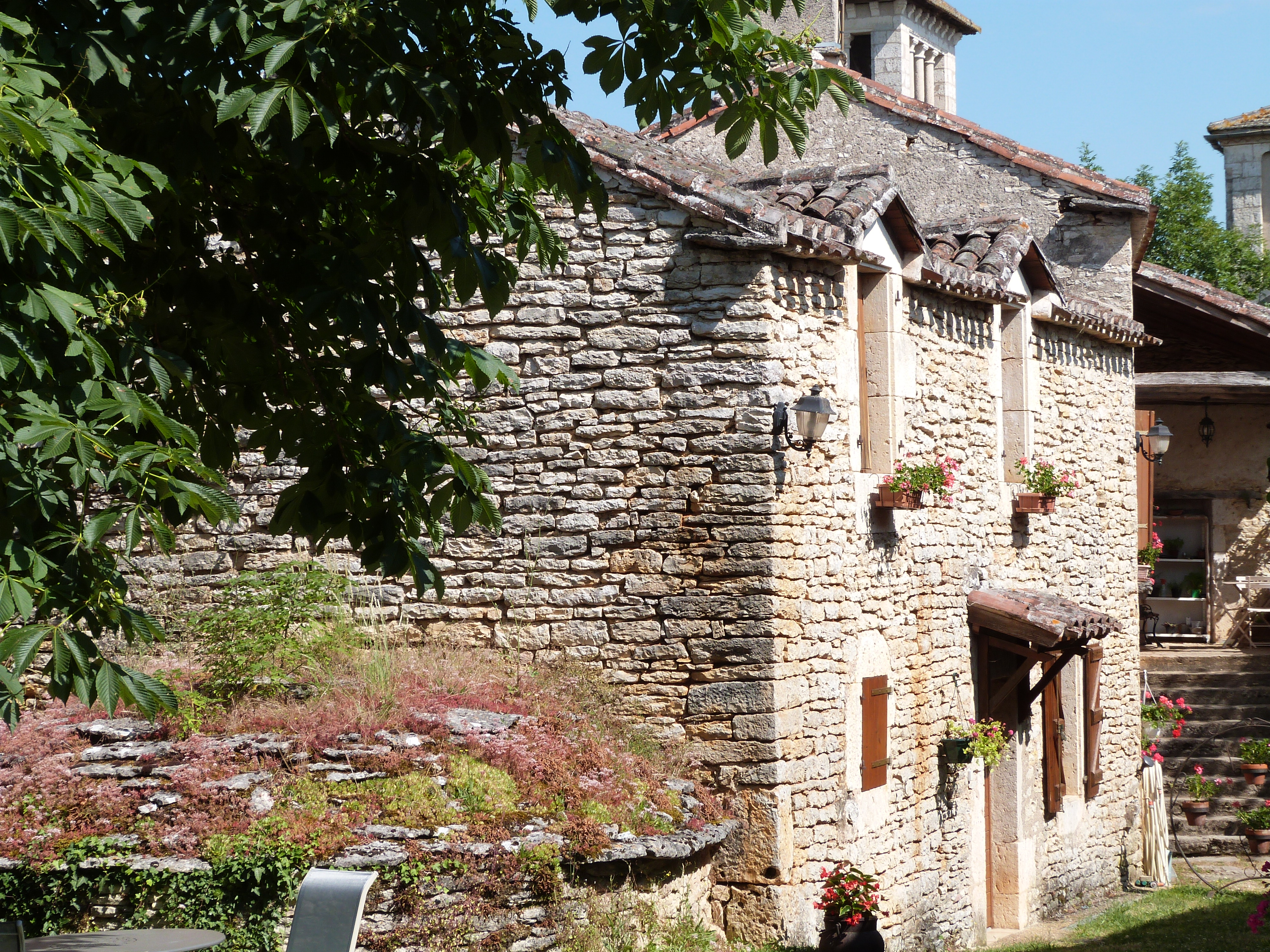 Maison dans une rue de la partie haute d'Aujols